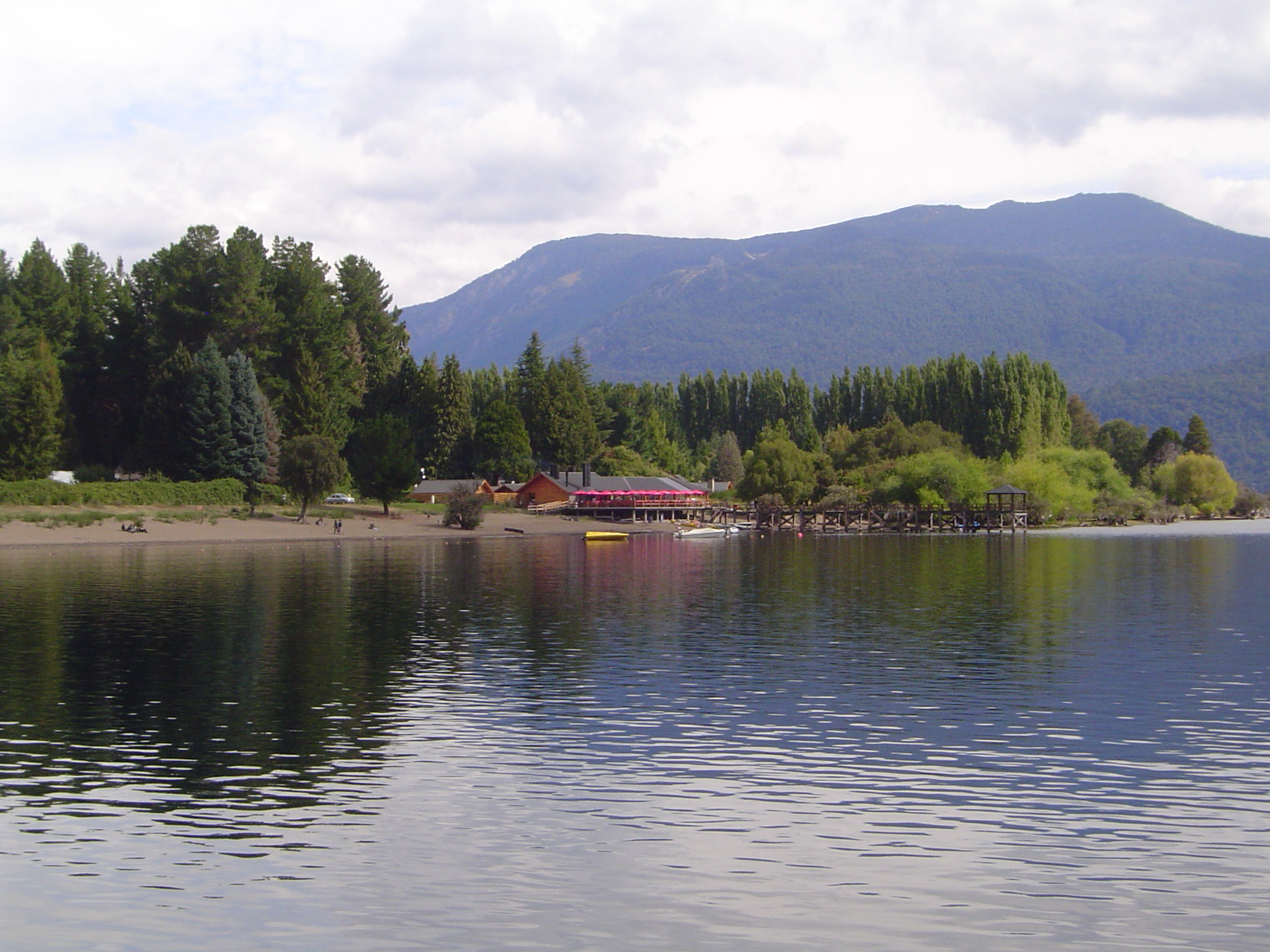 Quila Quina desde el lago